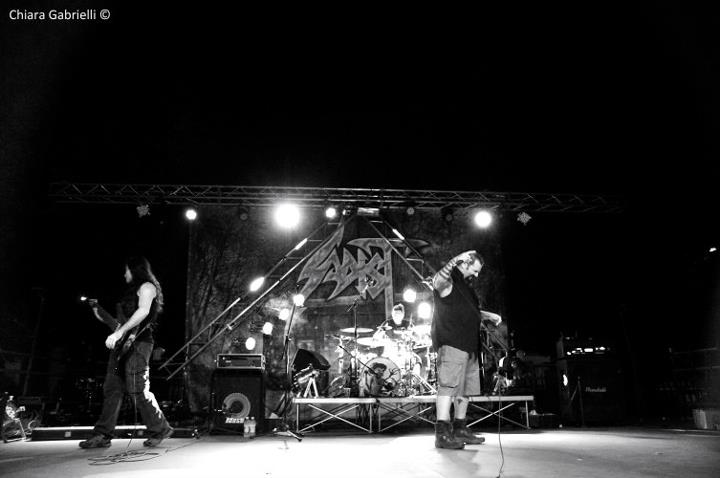 I Sadist al Metal Crusade